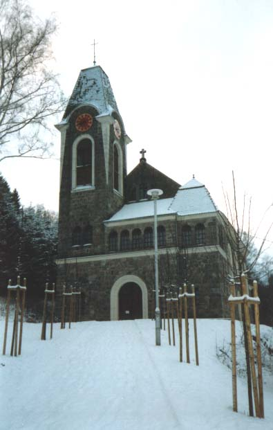 Kostel Navštívení Panny Marie v Potůčkách